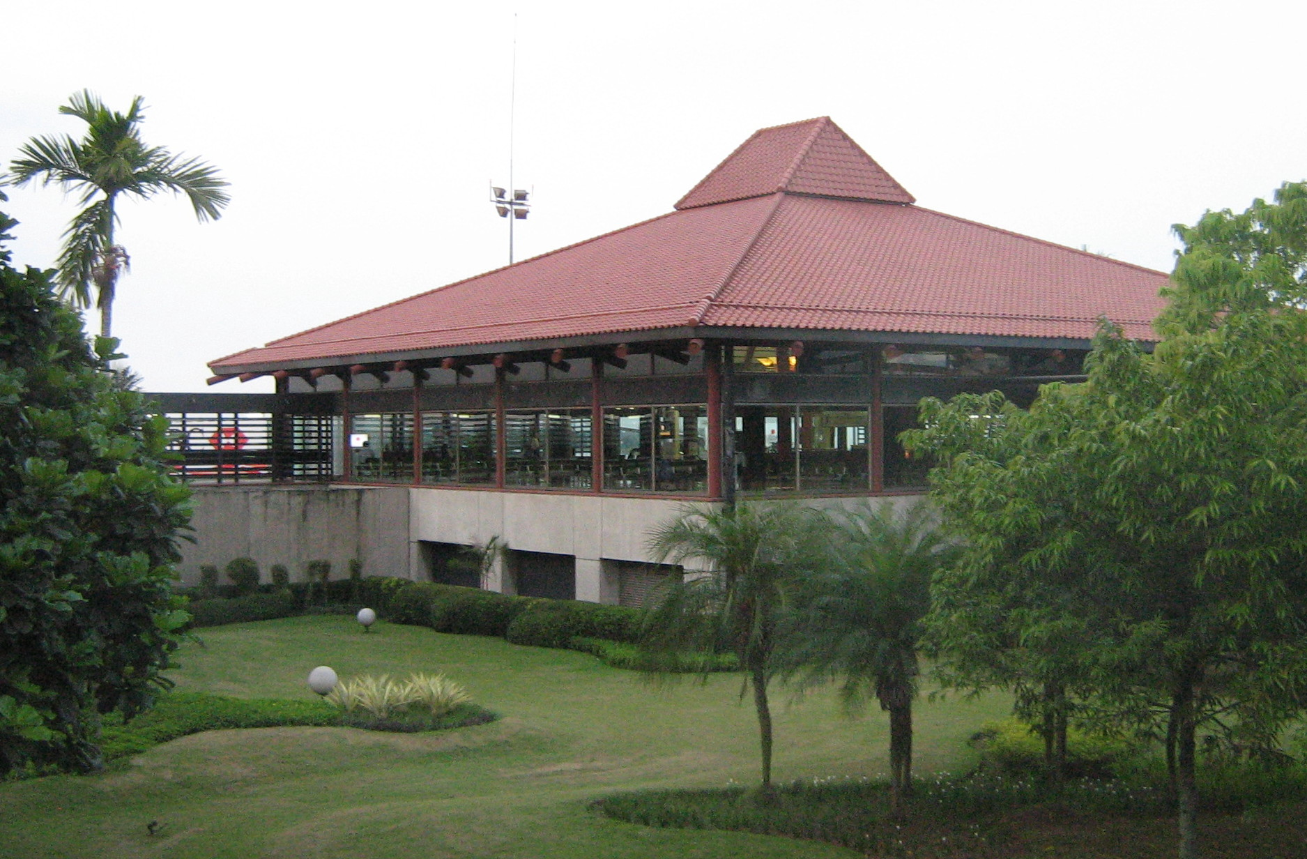 jakarta airport